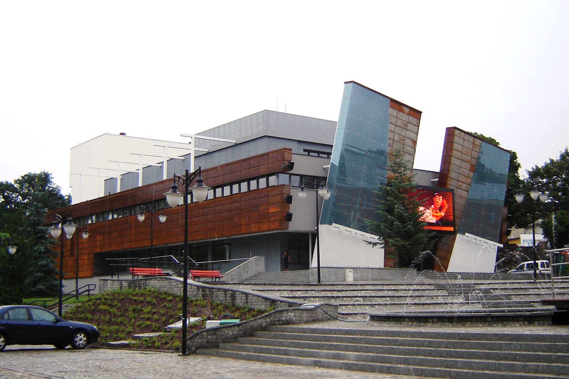 Kwidzyn, ul. Katedralna 18 - kinoteatr (Kino KCK), Kwidzynskie Centrum Kultury